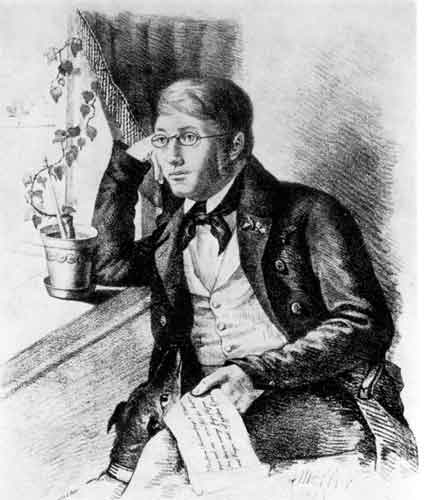 Henrik Wergeland (1808-1845), Norwegian writer.